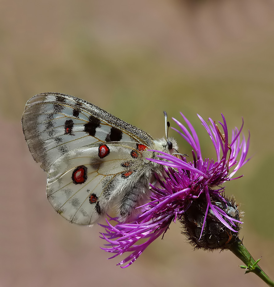 Apollofalter / Parnassius apollo vinningensis